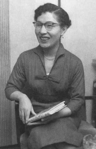 森赫子（女優）